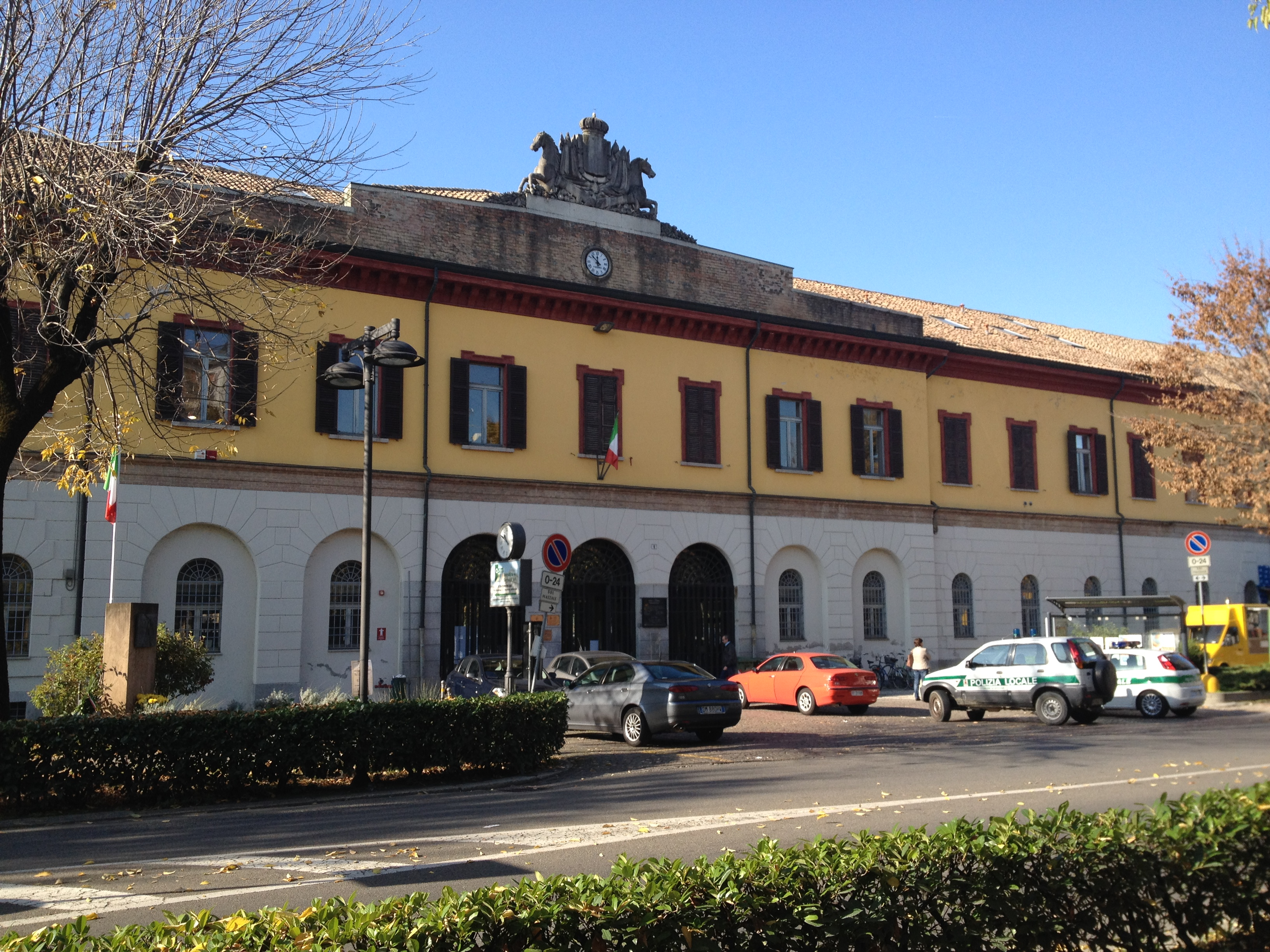 Vista della caserma di cavalleria di Voghera (PV)